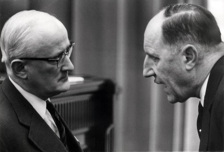 Discussie in de pauze van een debat tussen Minister Luns en Prof. C.L. Patijn over het onderwerp leveranties van onderzeeërs aan Zuid-Afrika. Nederland, Den Haag, 1966.